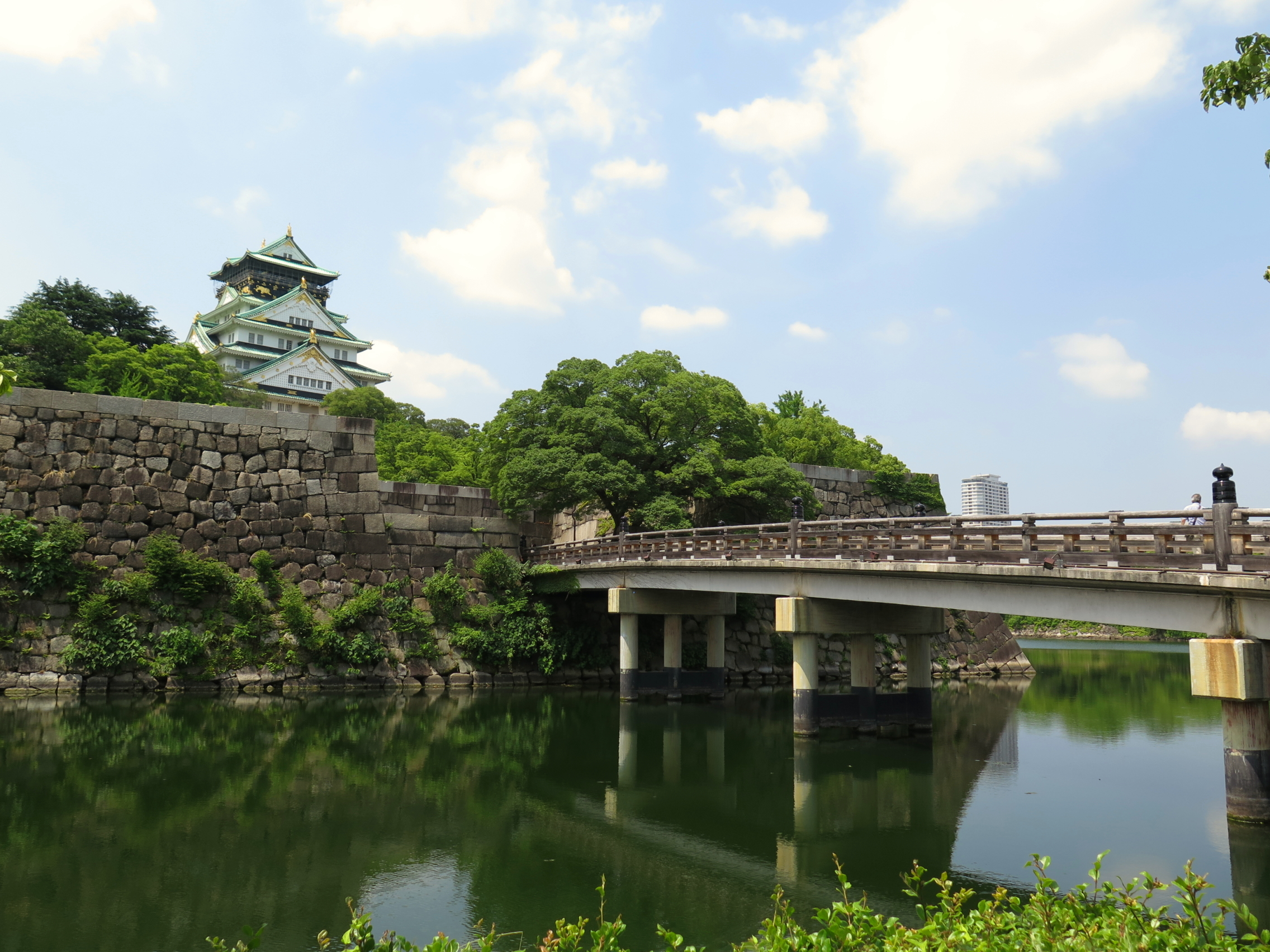 Osaka Castle